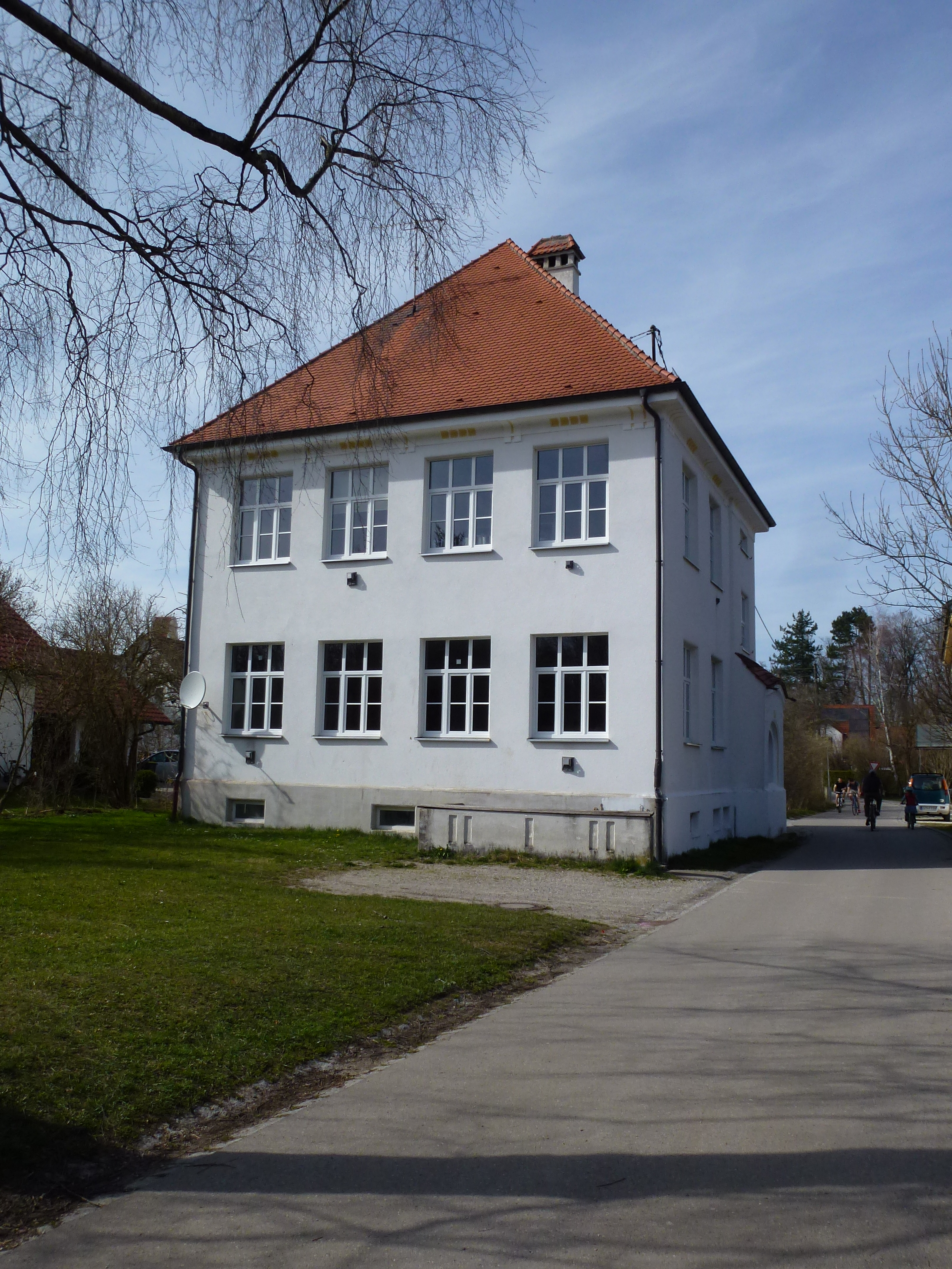 Windach, Raiffeisenweg 4, ehemaliges Schulhaus, heute Jugendhaus. Ansicht von Süd-Süd-Ost